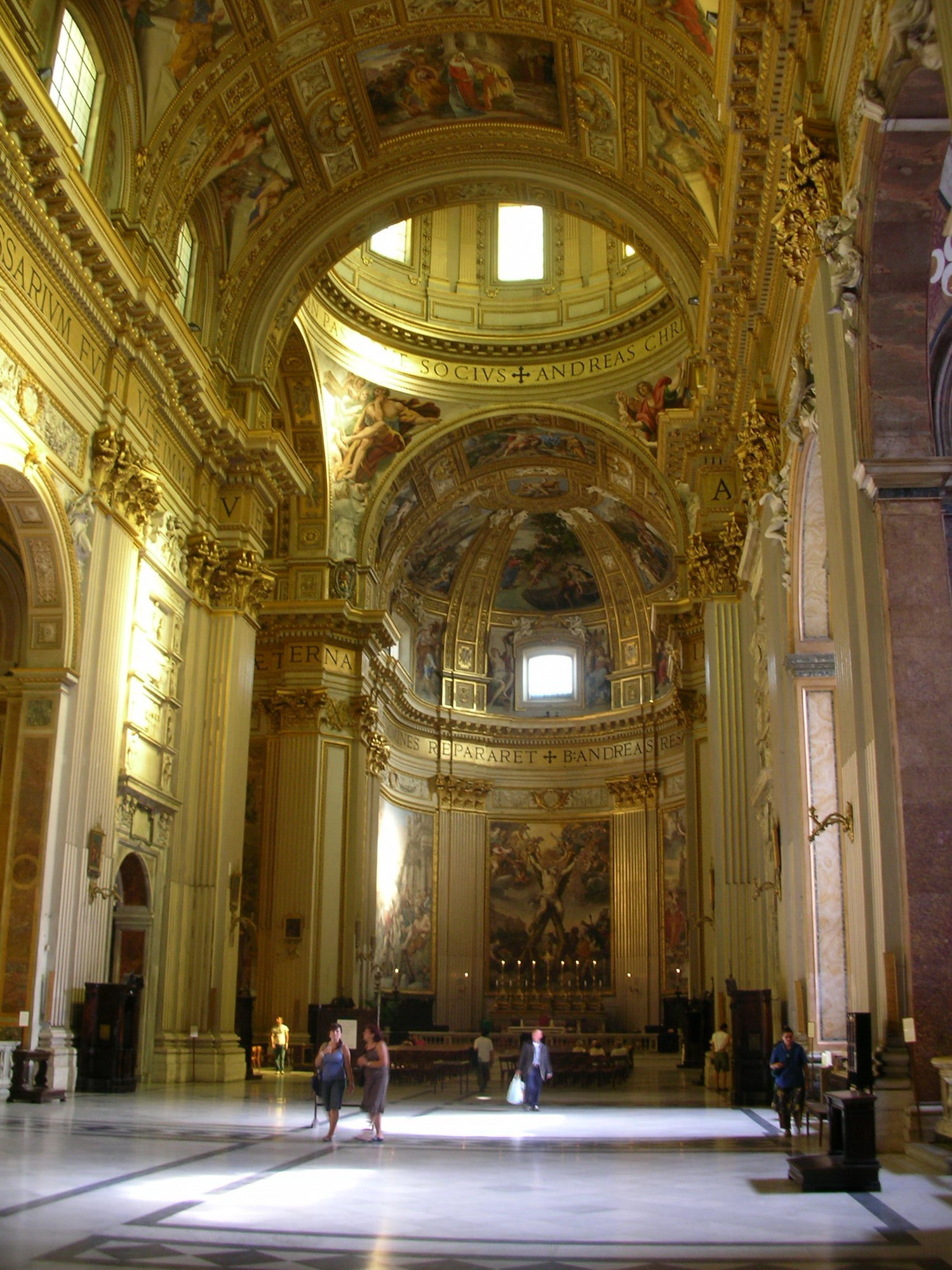 Interior, Sant'Andrea della Valle, Rome